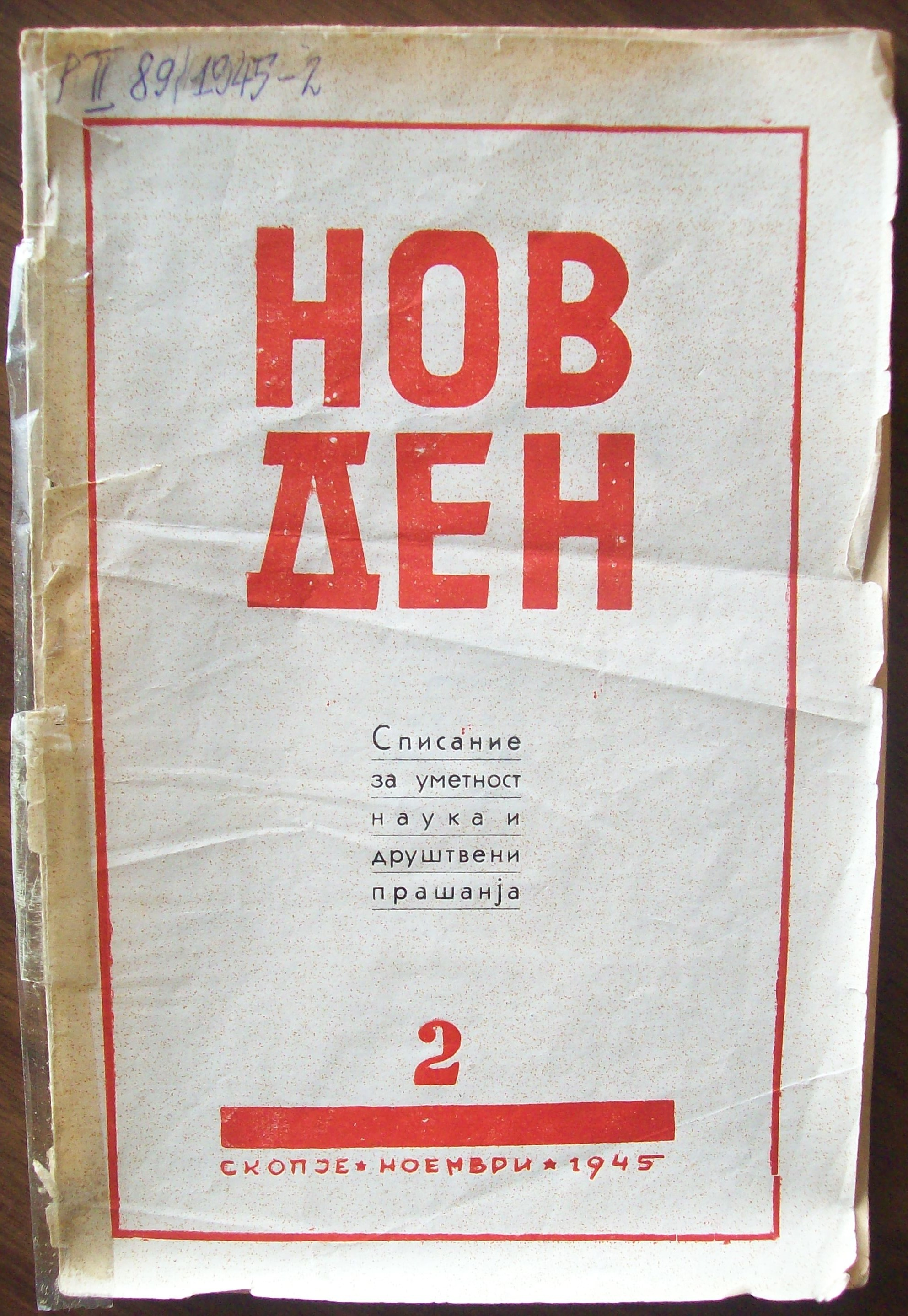 Нов ден, број 2